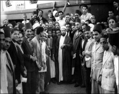 صورة حسن البنا وسط أحبابه في إحدي الزيارات لإحدي قري مصر Licensing This Egyptian work is currently in the public domain in Egypt because its copyright has expired pursuant to the provisions of Intellectual Property Law 82 of 2002. The 2002 law, which repealed Copyright Law 354 of 1954, was not retroactive, meaning that works which had already fallen into the public domain in 2002 remain out-of-copyright in Egypt. In order to be hosted on Commons, all works must be in the public domain in the United States as well as in their source country. Egyptian works that are currently in the public domain in the United States are those whose copyright had expired in Egypt on the U.S. date of restoration (January 1, 1996) pursuant to the provisions of the old 1954 law which was in effect at the time. Type of workCopyright has expired in Egypt if...Copyright has expired in the U.S. if... A Non-creative photographic or audiovisual workspublished prior to 1987published prior to 1981 B Other works with an identifiable authorthe author died prior to 1965the author died prior to 1946 or published prior to 1923 C Other works that are either anonymous or pseudonymouspublished prior to 1965published prior to 1946 D Other works (e.g. collective works) whose copyright is held by a legal personpublished prior to 1965published prior to 1946 Certain types of Egyptian works (official documents, stamps, works of national folklore) should use specific license tags instead of this generic tag. تصنيف:صور جماعة الإخوان المسلمين تصنيف:مرشدو الإخوان المسلمين تصنيف:إخوان مسلمون مصريون